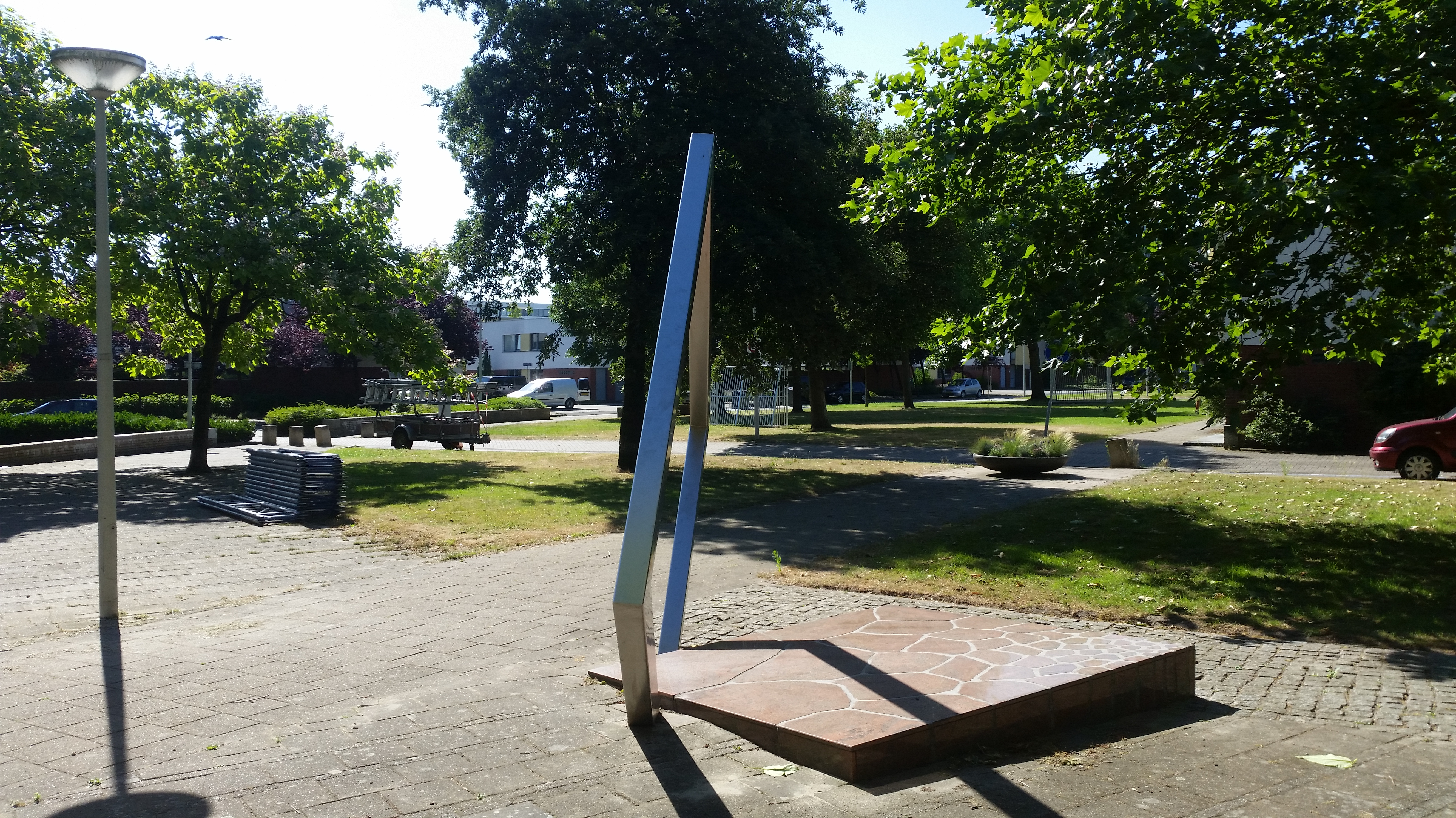 Plateau met lijst; kunstwerk aan de Ben Websterstraat, jazzbuurt, Slotervaart, Amsterdam Nieuw-West; kunstenares Irini Schrijer